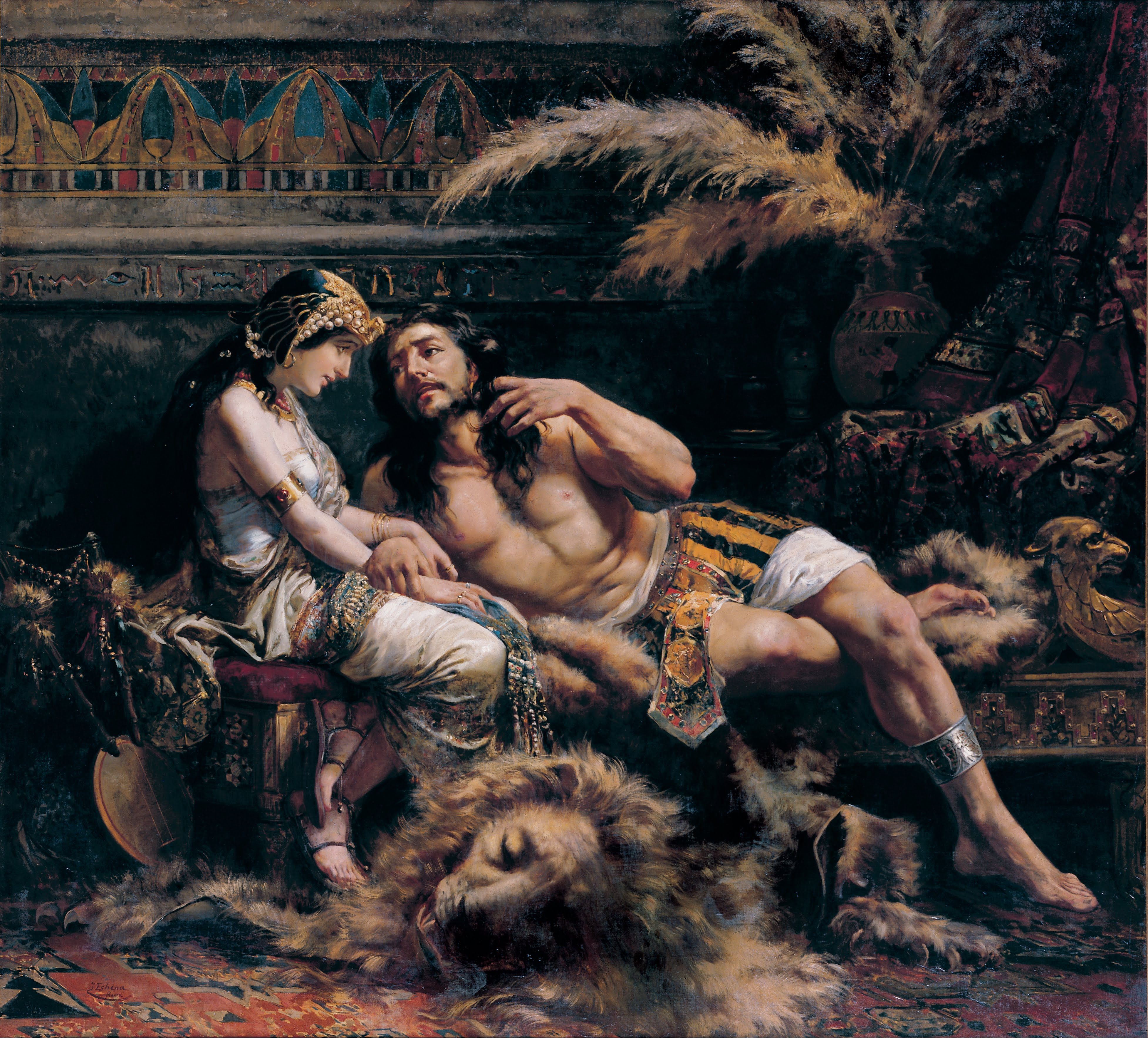 La obra representa a Sansón, juez de Israel, acompañado por su amante filistea Dalila, que acabó traicionándole y entregándole a los filisteos, enemigos de los israelitas.